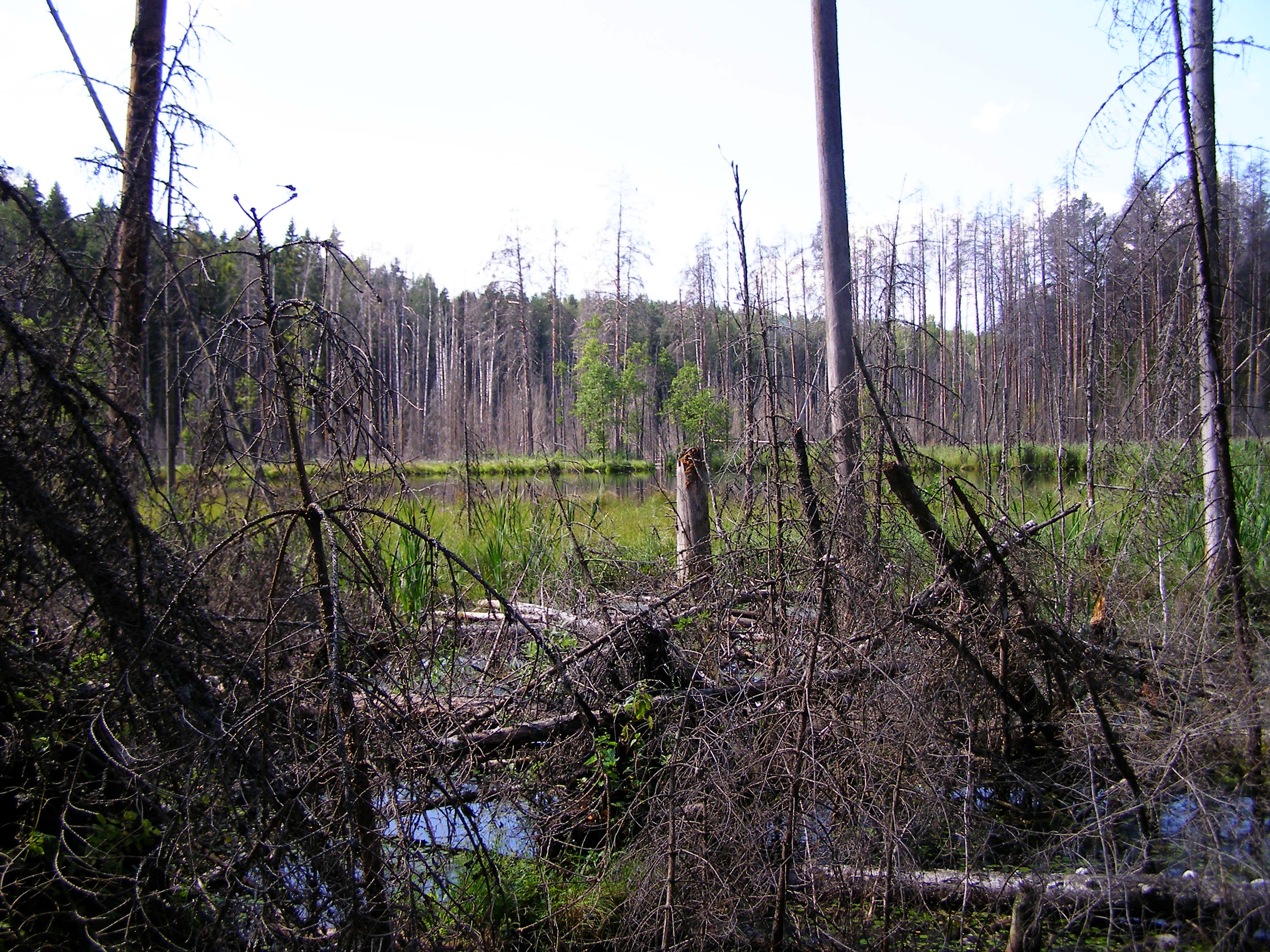 Mudajärv (Väikene Mustjärv) Karula rahvuspargis, vaade läänest.